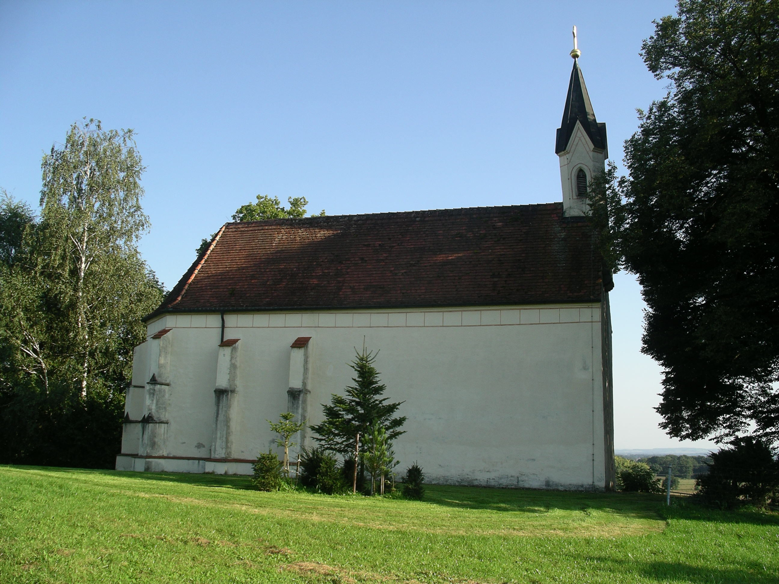 Filialkirche Rottersham, Gde. Ruhstorf a.d. Rott